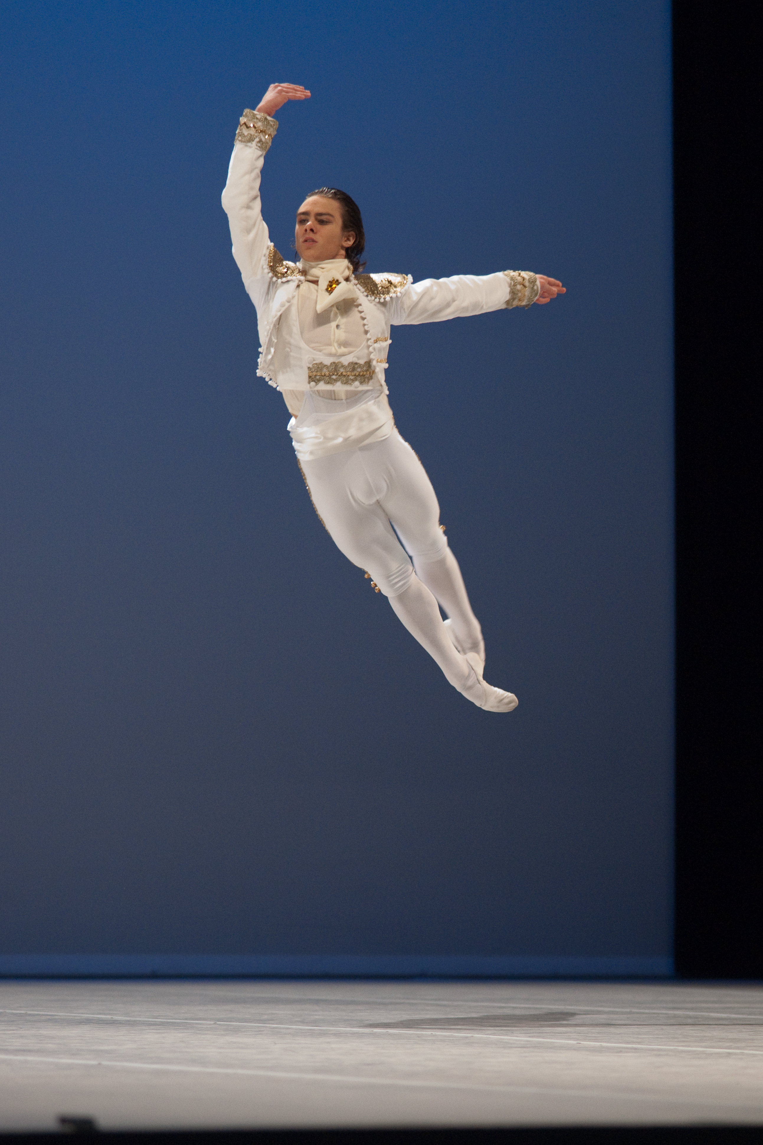 Variation extraite de Don Quichotte au Prix de Lausanne 2010. The making of this document was supported by Wikimedia CH. (Submit your project!) For all the files concerned, please see the category Supported by Wikimedia CH.